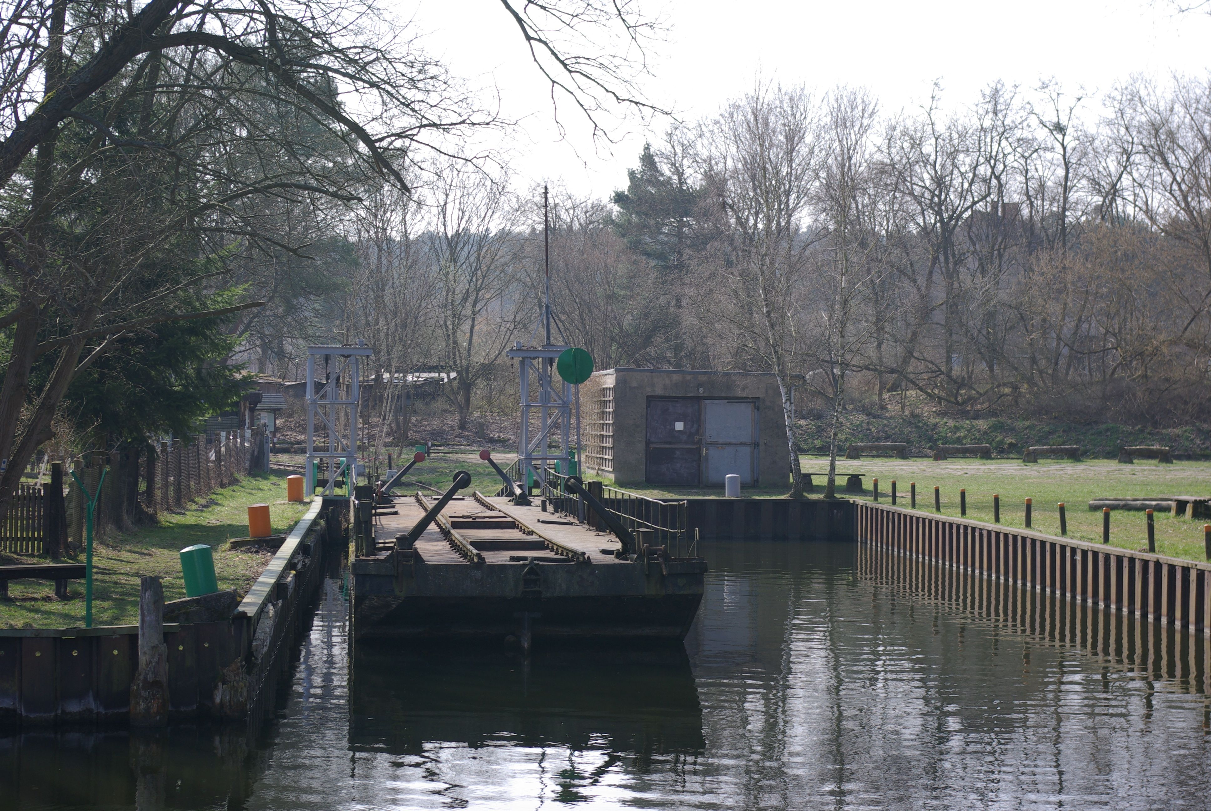 Fürstenberg/havel in Brandenburg. Blick auf die ehemalige Eisenbahnfähre in Fürstenberg. Zu sehen ist die eigentliche Fähre und der südliche Anleger von Norden aus. Die Fähre steht unter Denkmalschutz.